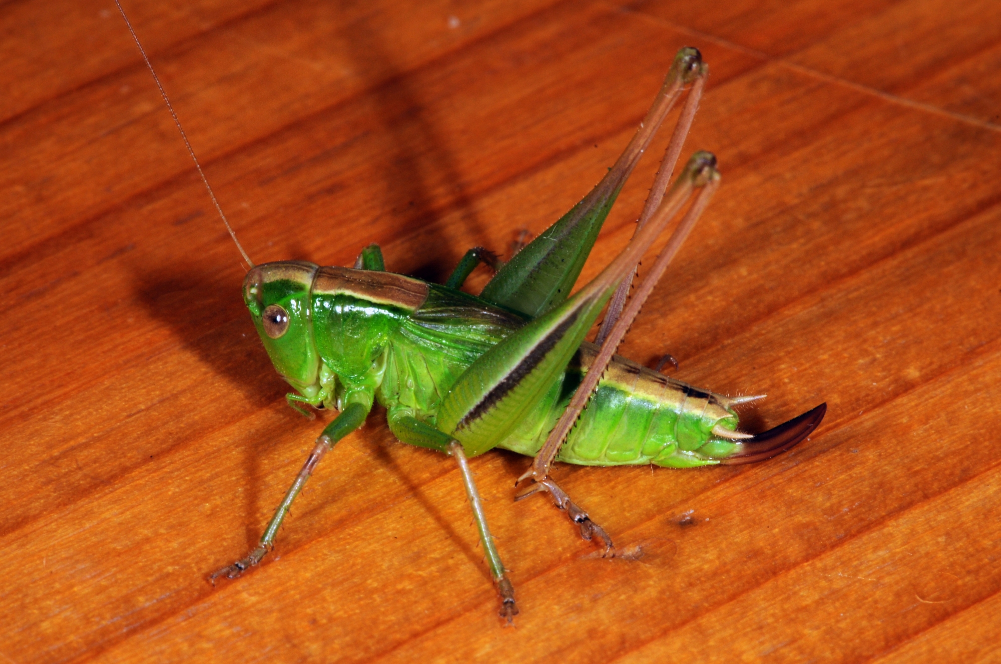 Metrioptera bicolor, Weibchen, Mainzer Sand, Rheinland-Pfalz, Deutschland